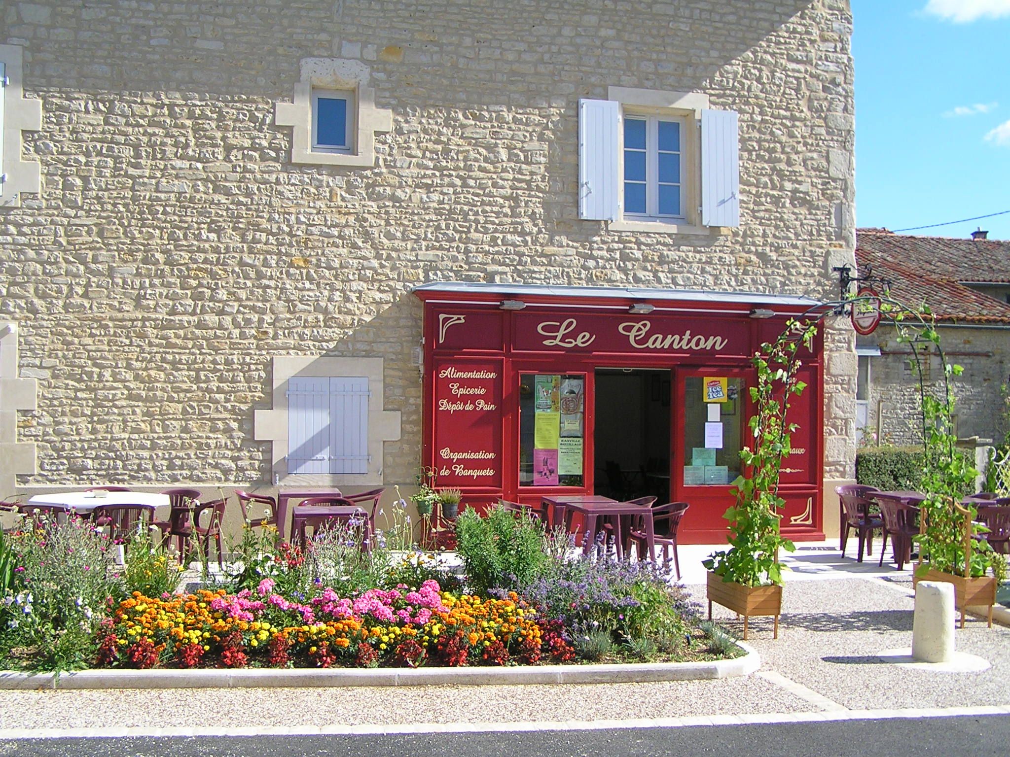 bar du village sur la place de Longré